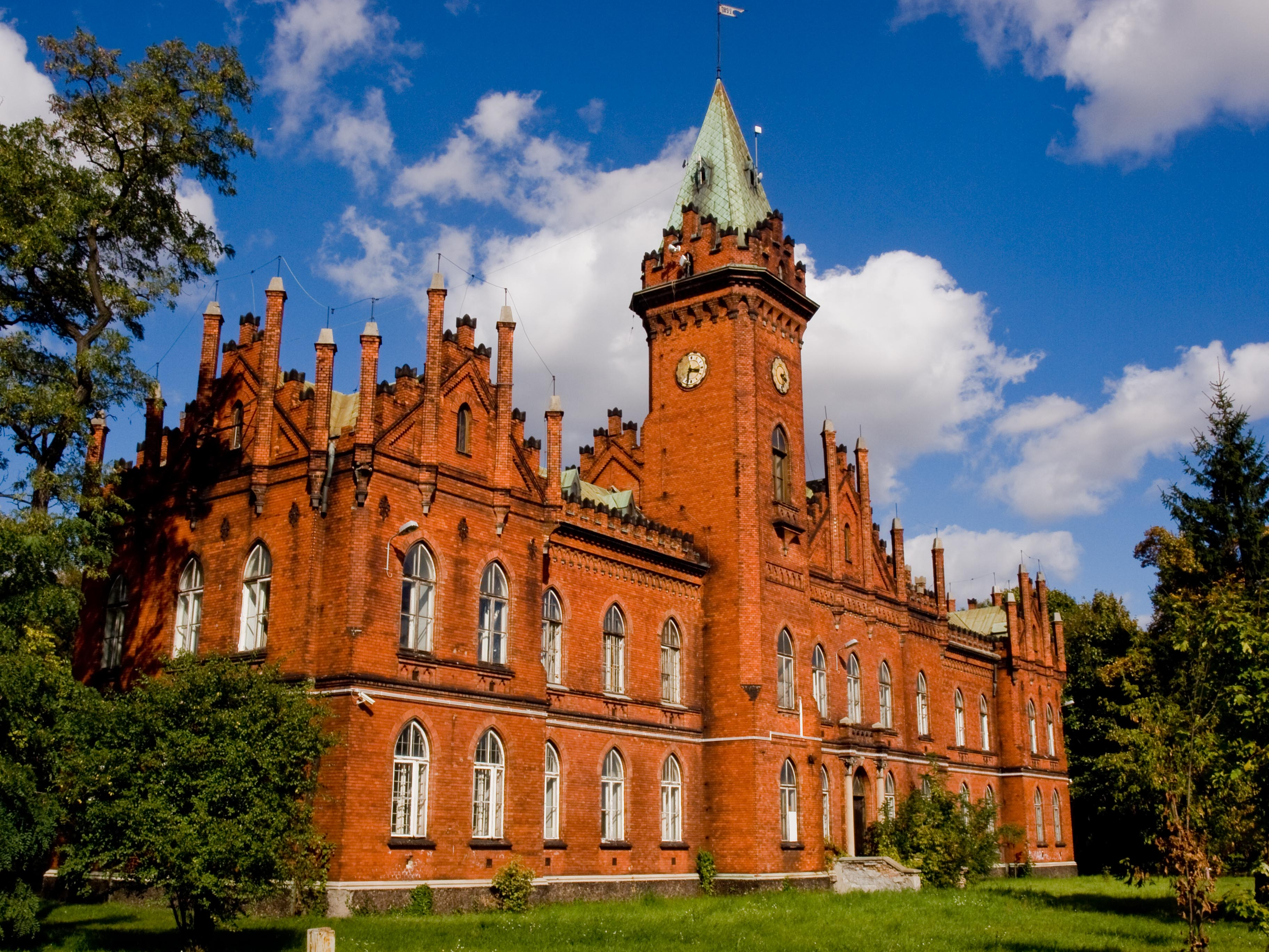 Zakłady Napraw Taboru Kolejowego k. XIX-XX: budynek dyrekcji park kuźnia odlewnia modelarnia obręczarnia hala remontu obrabiarek hala napraw wagonów osobowych hala napraw wagonów towarowych bocznica kolej. z pomnikiem brama z fragm. ogrodzenia bunkier 3 wieżyczki strzelnicze Pruszków, ul. 3 Maja 8